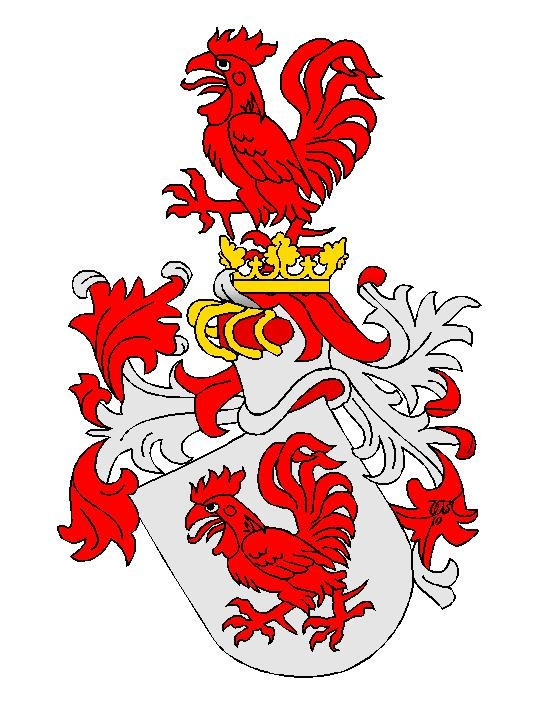 Wappen der Freiherren von Hahn